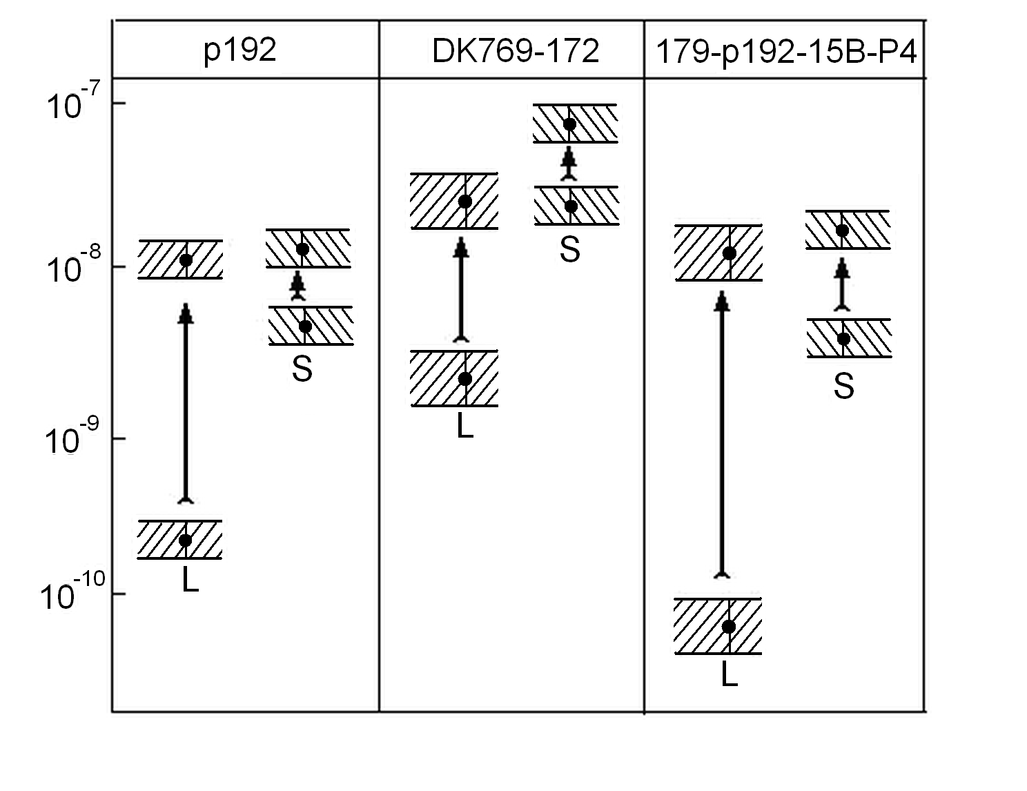 Более высокая частота мутаций в дерепрессированном гене ade2 («L») в сравнении с супрессорными (“S”) генами у разных штаммов дрожжей. Слева отложена частота мутаций генов.